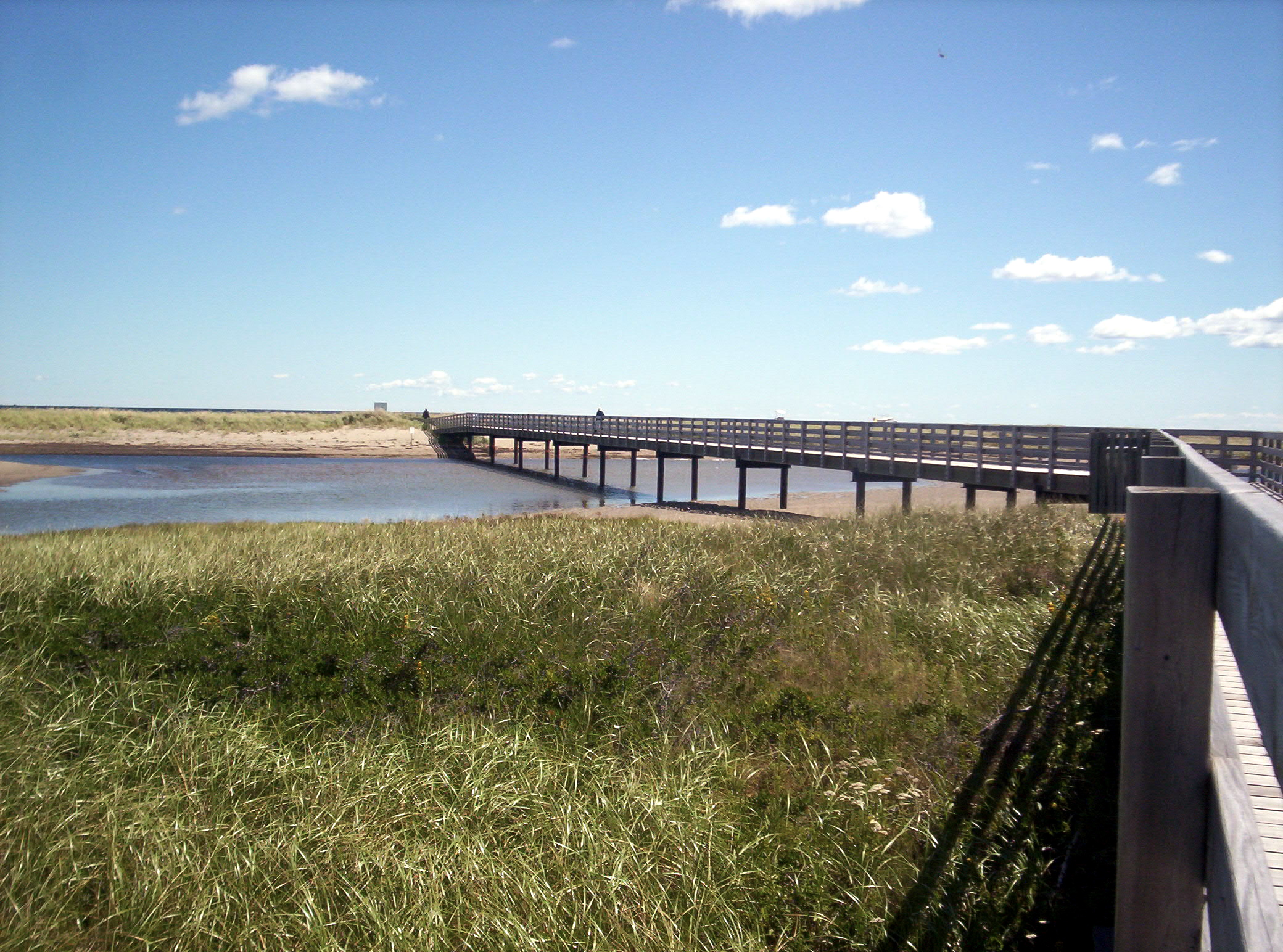 Passerelle menant à la plage Kellys dans le parc national de Kouchibouguac